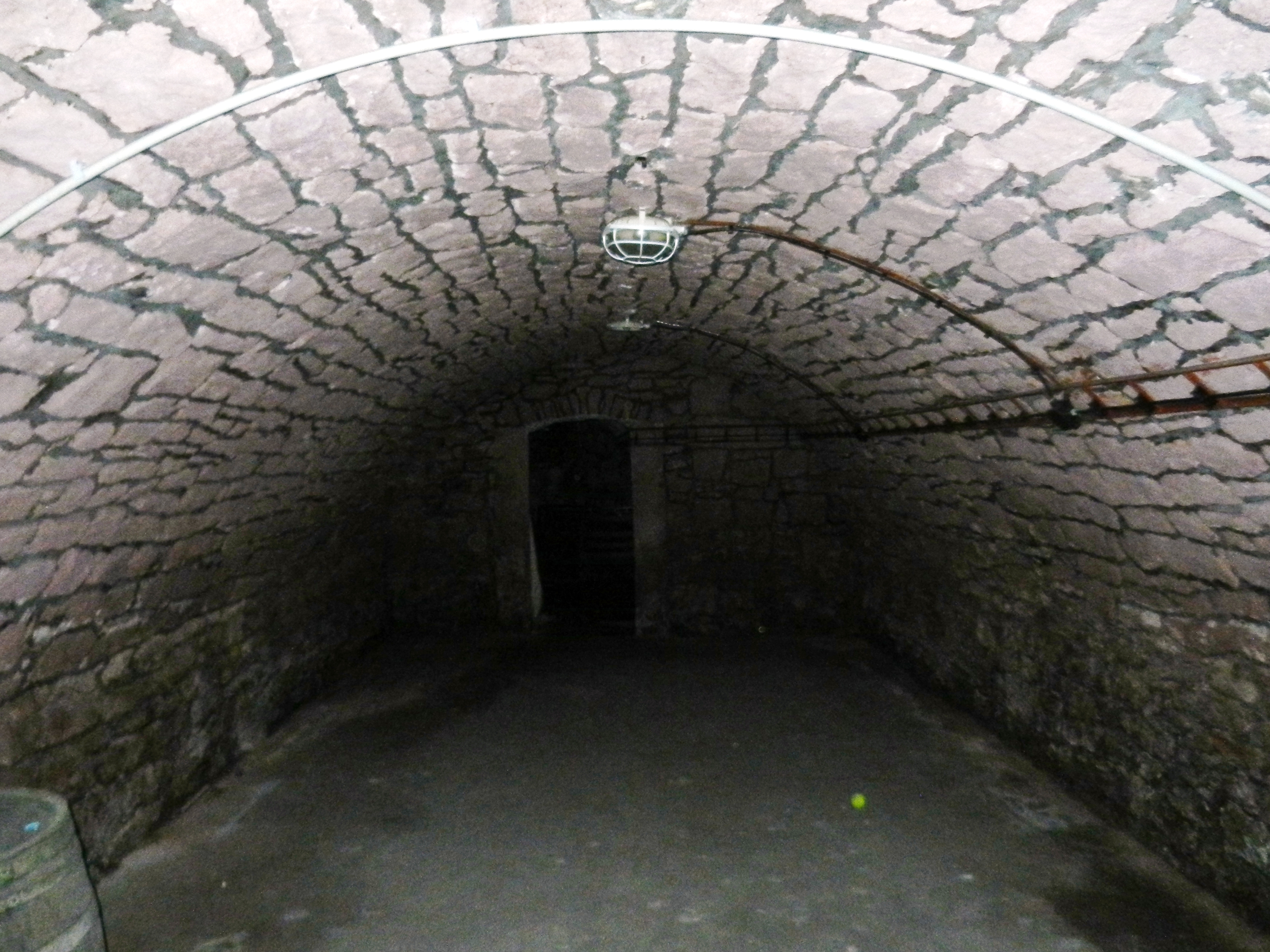 Die Gewölbekeller des Ratshauses dienten als Vorratsräume, Weinkellernutzng um 1579/80 mit histor, Rechnung belegt. Die Kellergewölbe der Häuser auf der Rathausseite waren miteinander verbunden. Zumauerungen der ehem. Verbindungöffnungen sind vorhanden, dies hatte u.a. strategische Verteidigungszwecke.